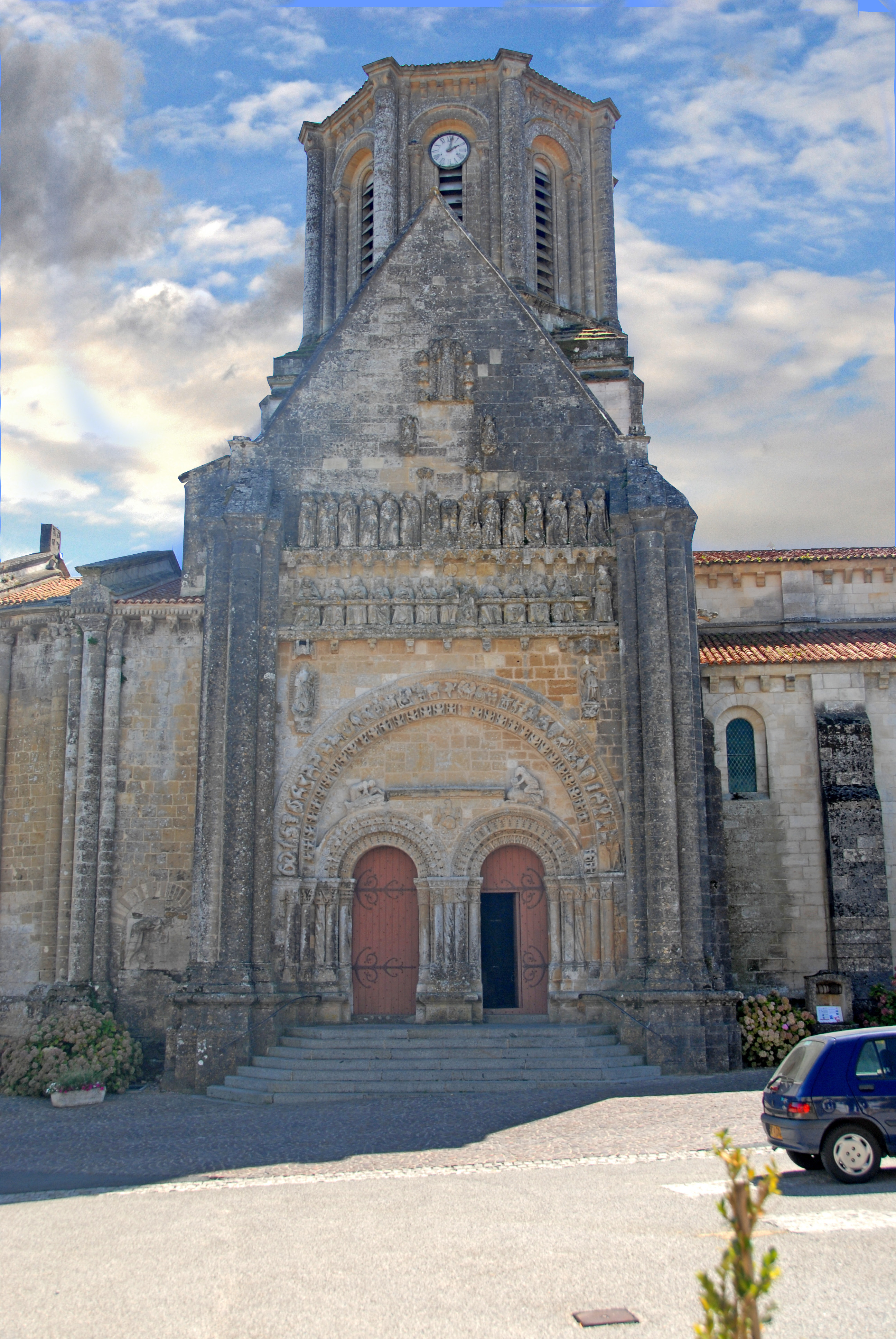 Vouvant, romanische Kirche, Fassade, nördlicher Querhausarm